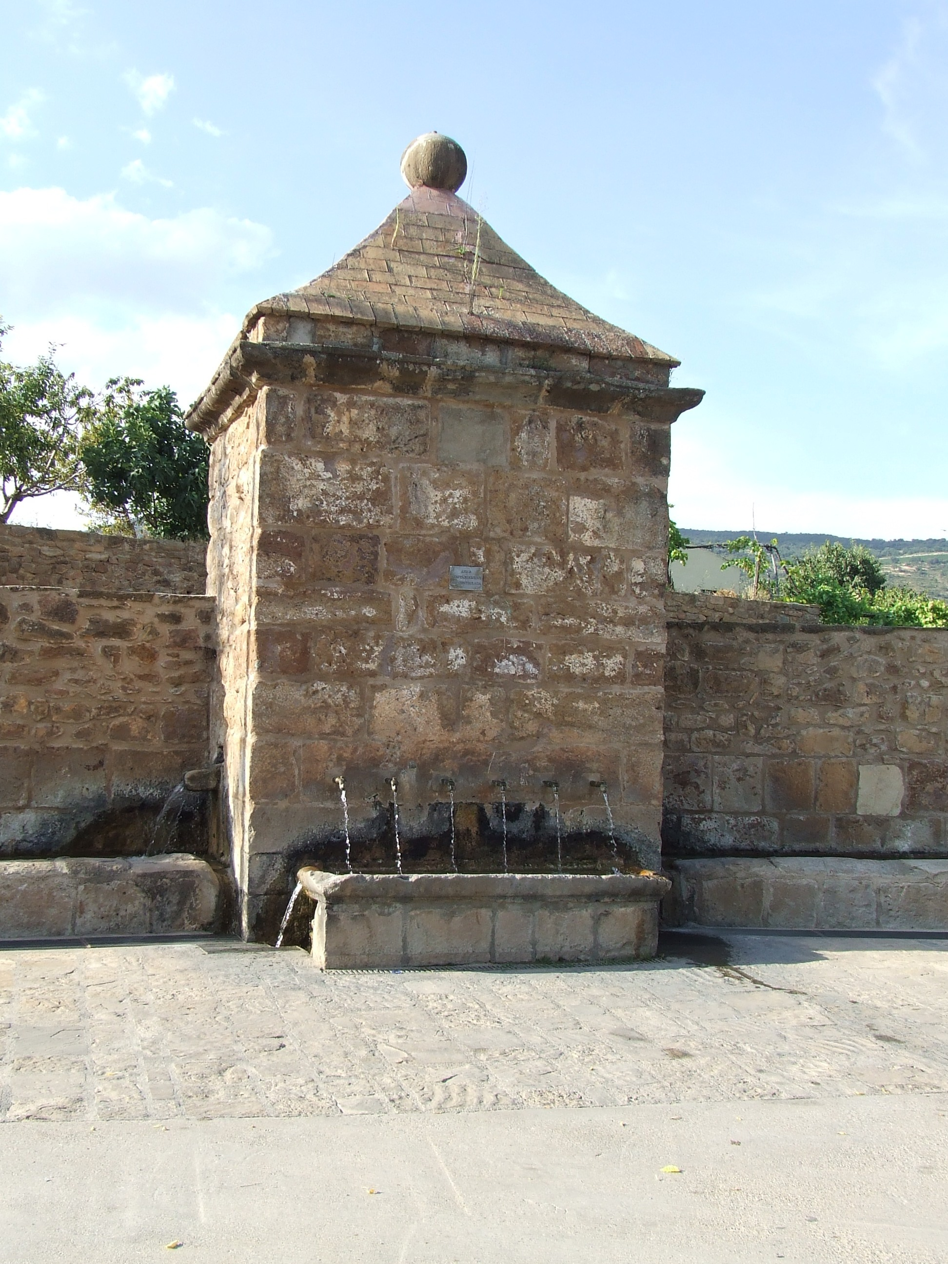 La Font de Caps (Talarn, Pallars Jussà)